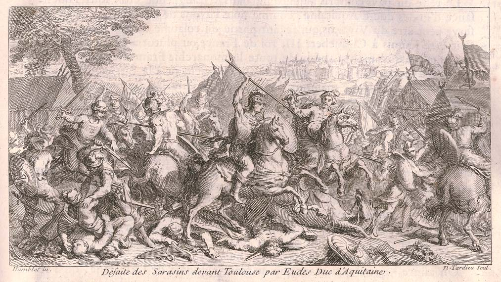 Porážka Saracenů před Toulouse Odem, vévodou akvitánským (rok 721) “, v Claude de Vic a Fr.-J. Vaissete, Histoire générale de Languedoc, kniha 8. Město Toulouse, Městský archiv, Res 105